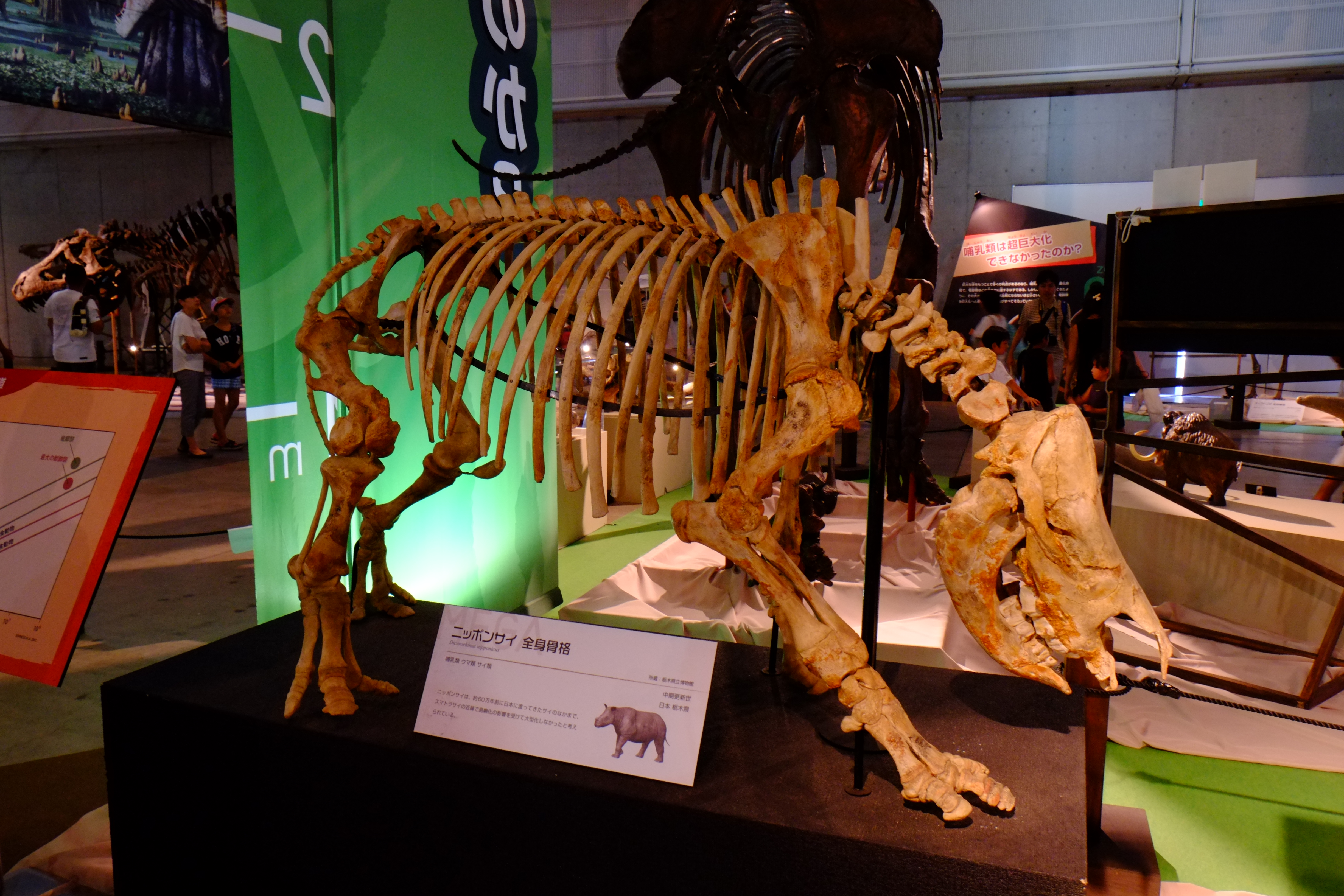 ニッポンサイ。60万年前に日本に来たサイ。